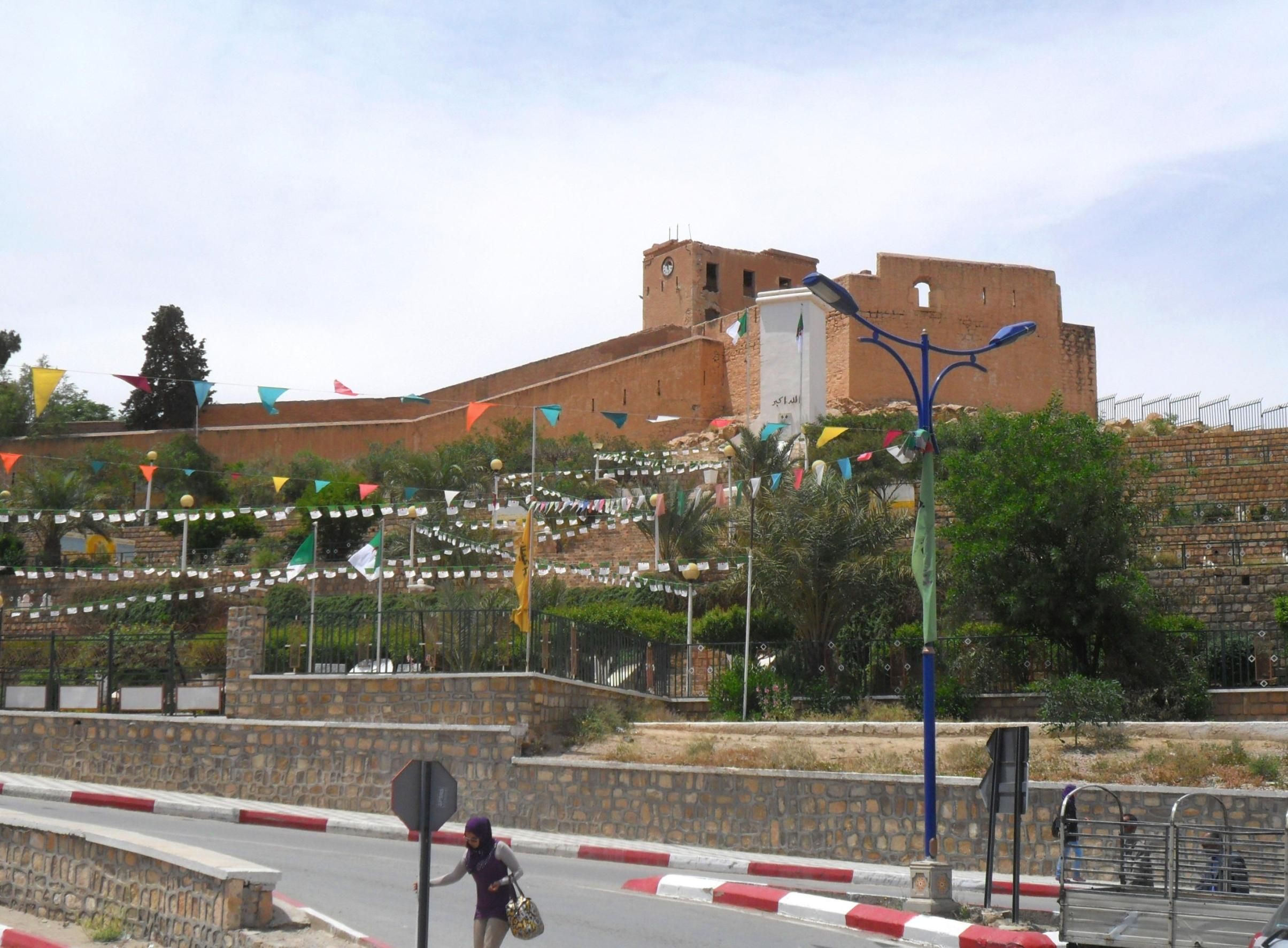 monument Bou saada بوسعادة